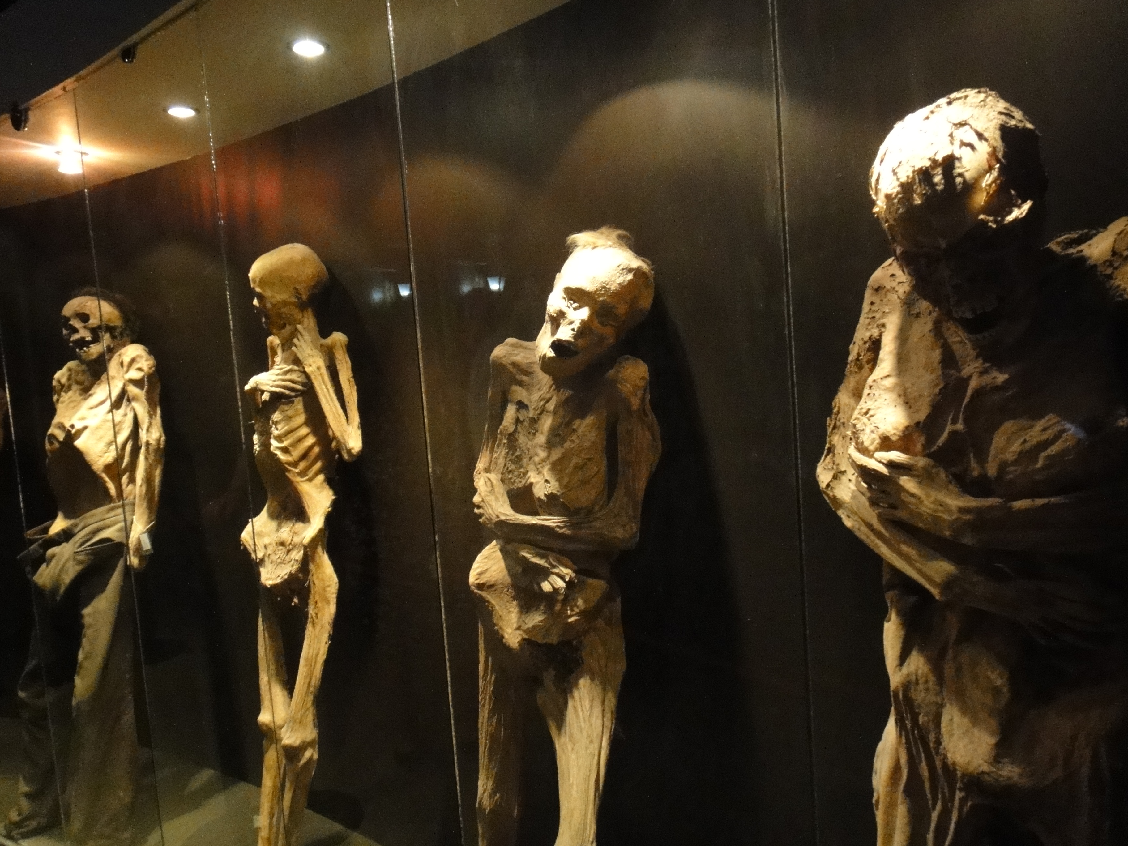 MOmias de Guanajuato, en un museo un poco retirado del centro de la ciudad